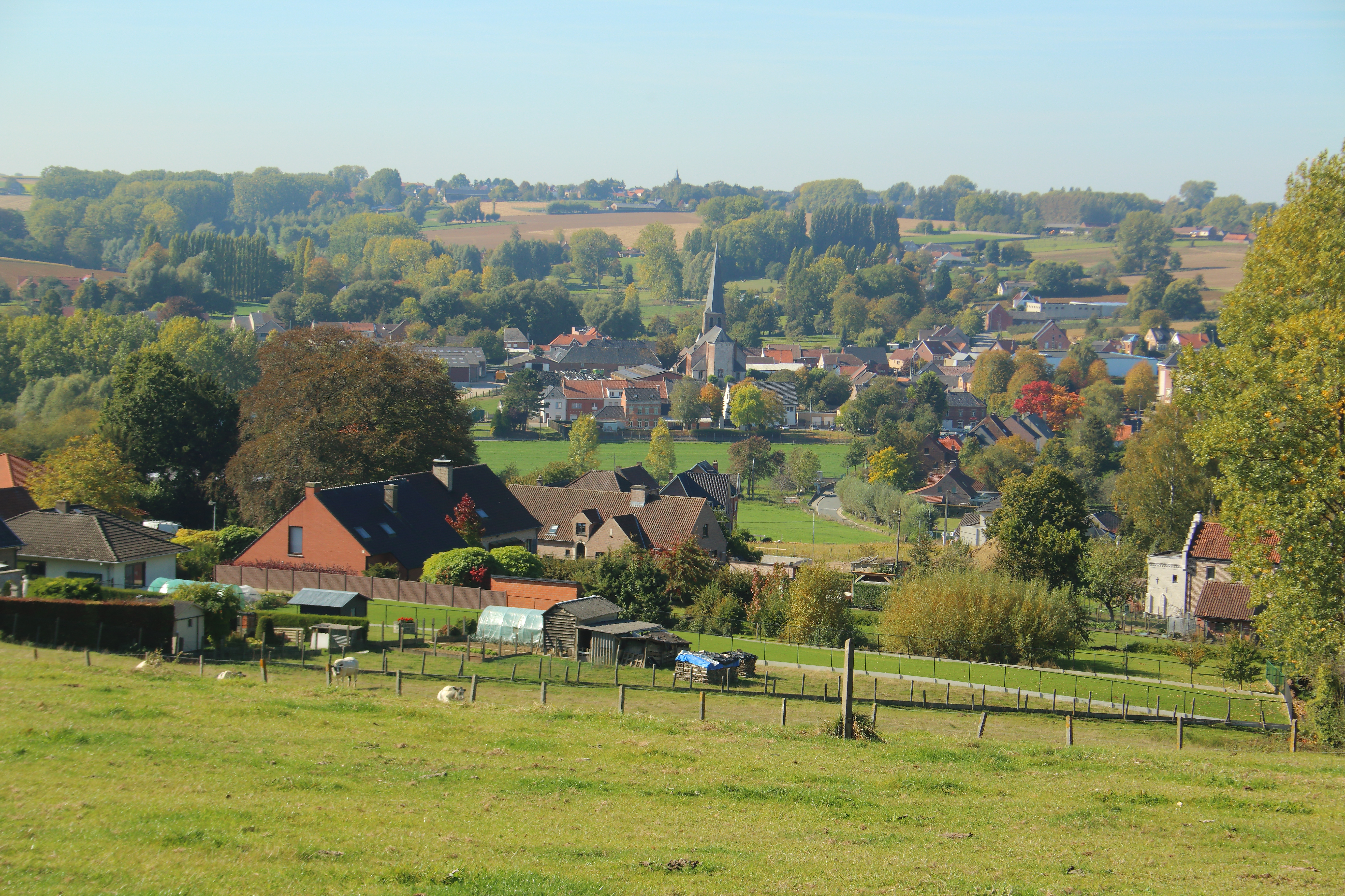 zicht op Michelbeke, Brakel, Vlaanderen, België